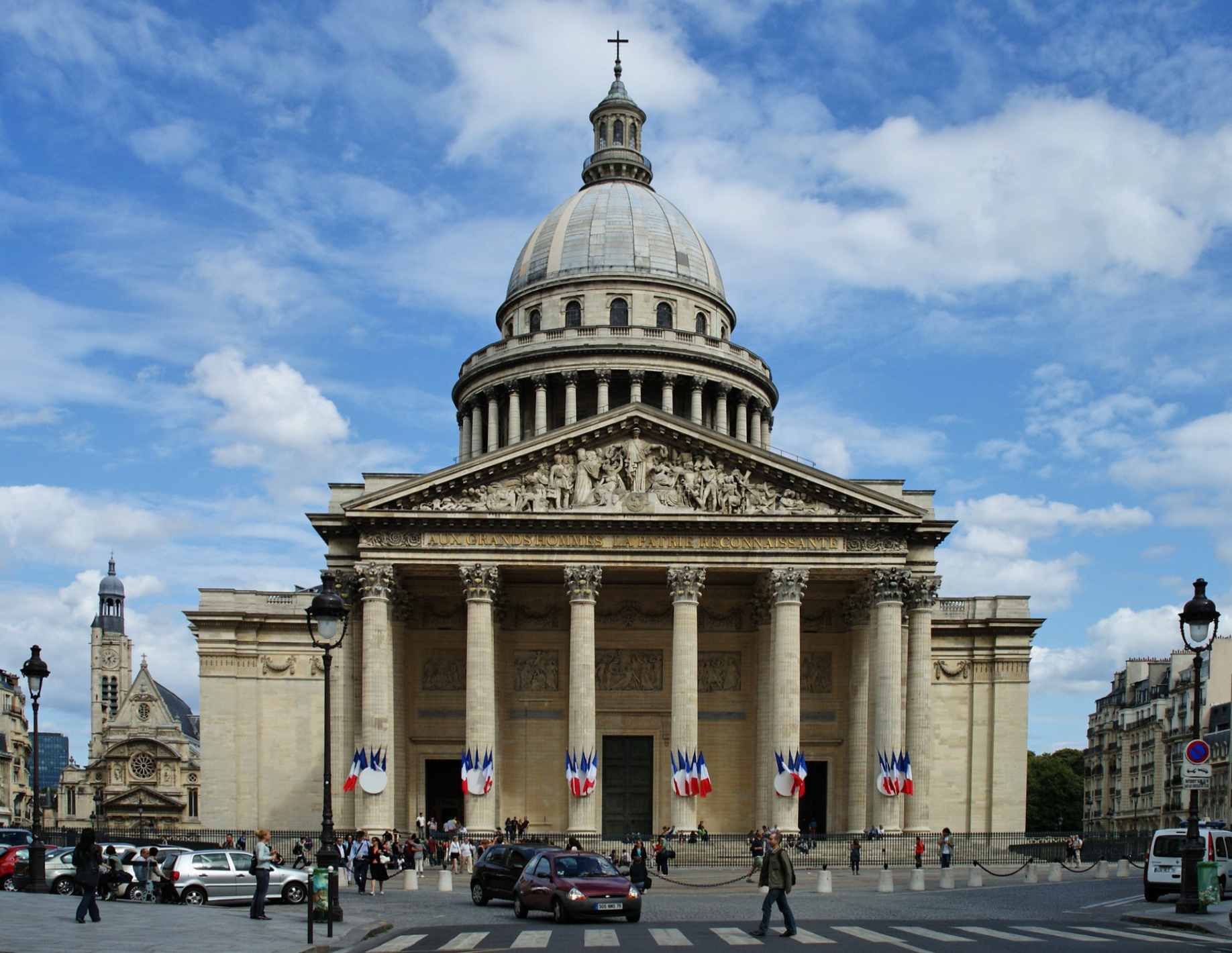 Façade du PANTHEON de Paris.